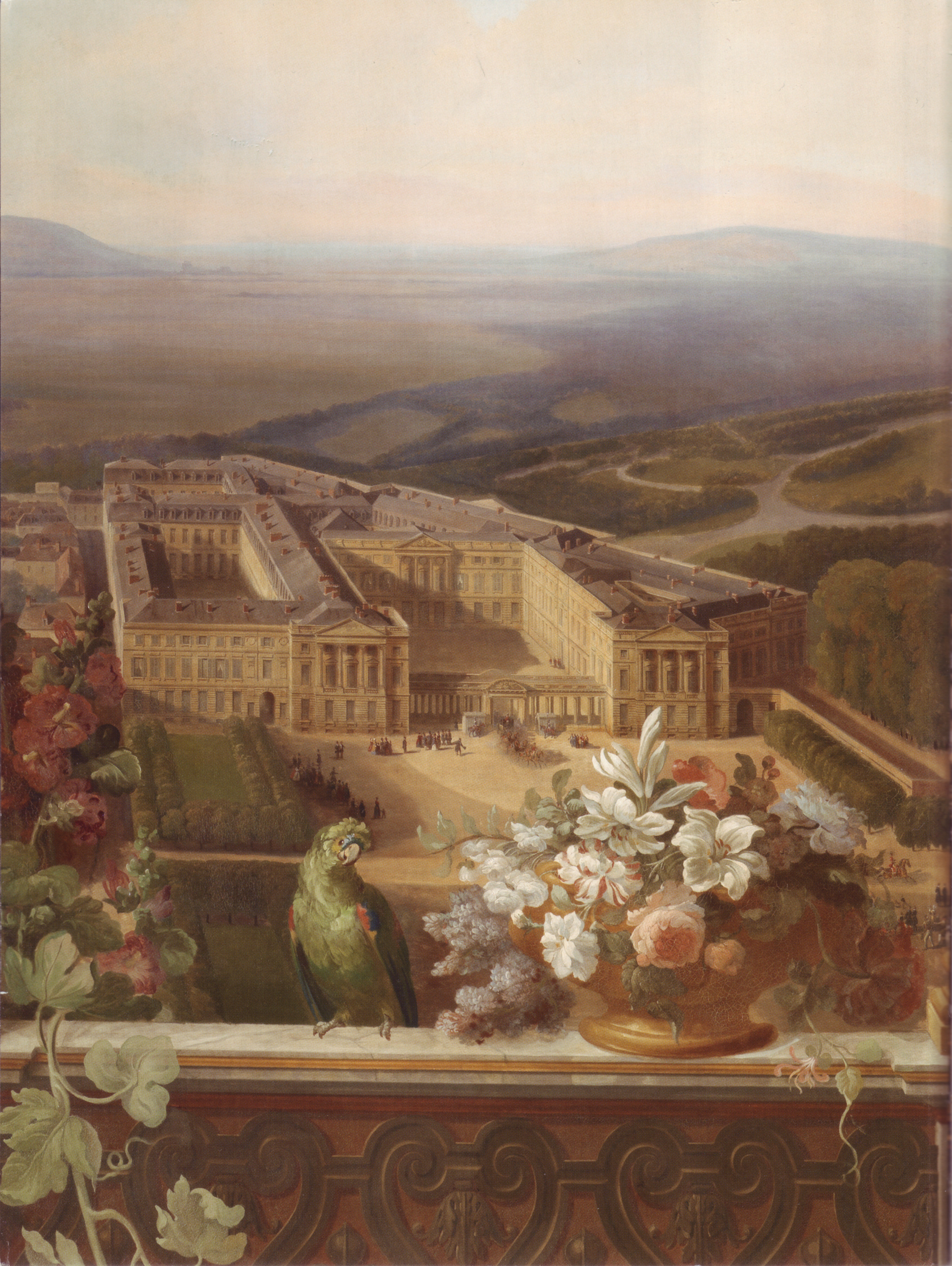 Ansicht des Schlosses Compiègne im Jahr 1842